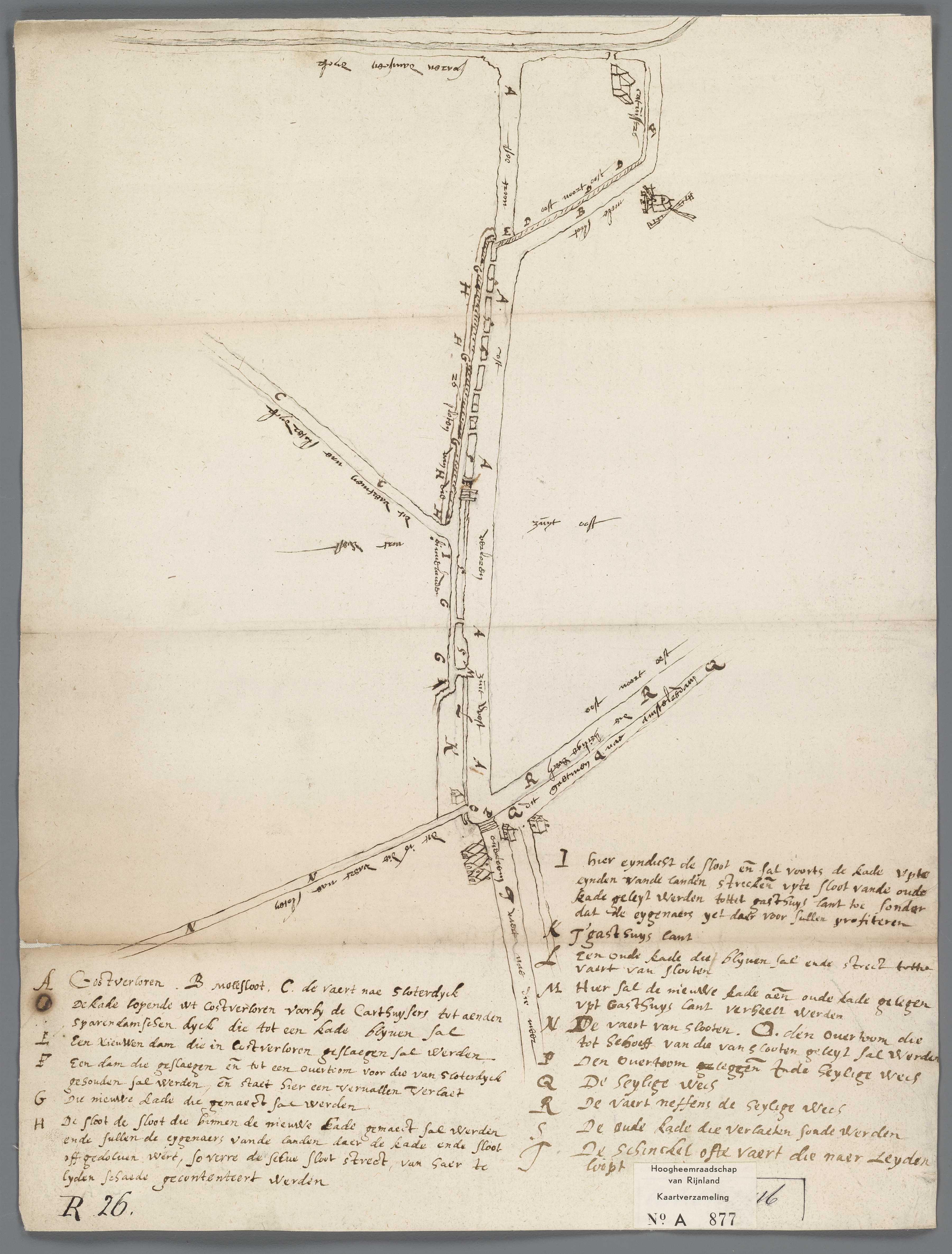 Situatieschets van de aanleg van de nieuwe kade van de Sloterbinnenpolder langs de Kostverlorenvaart. Noordoost is boven. - Bevat legenda met uitvoerige aanduiding van al hetgeen met de nieuwe kade in verband staat.